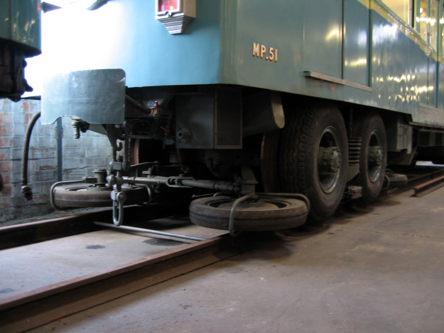 Autre détail de bogie de MP 51 Journées du patrimoine AMTUIR 15/09/2007.